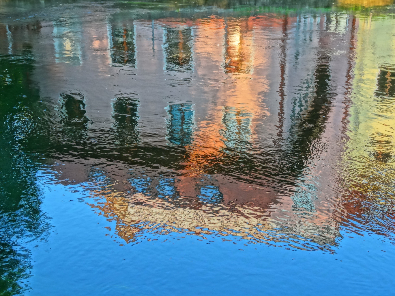 Wenecja Bydgoska – zespół architektoniczny Starego Miasta w Bydgoszczy zbudowany bezpośrednio nad rzeką Młynówką.